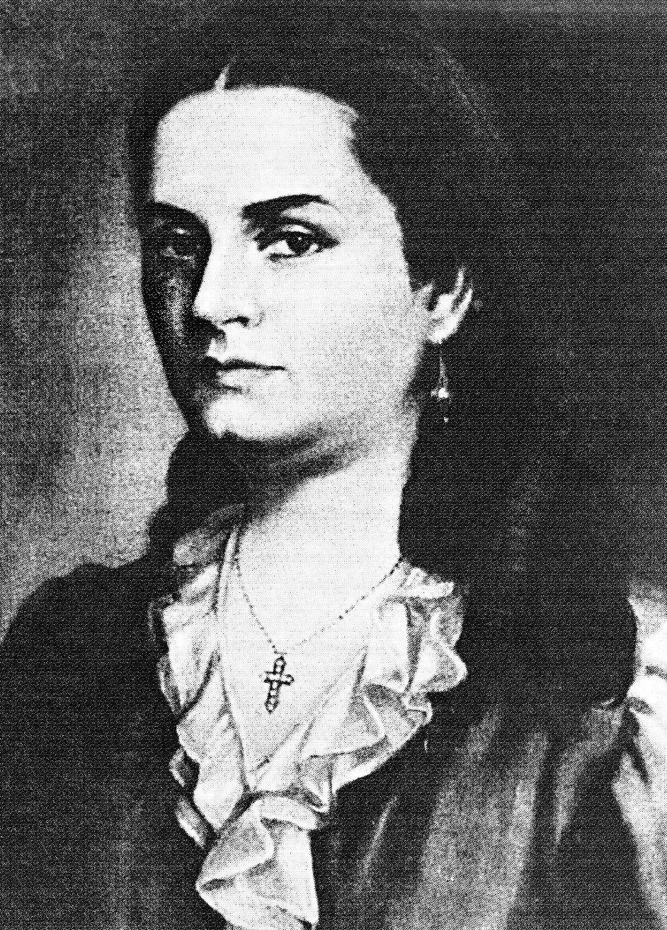 rosa merino la primera mujer que canto el Himno Nacional del Perú